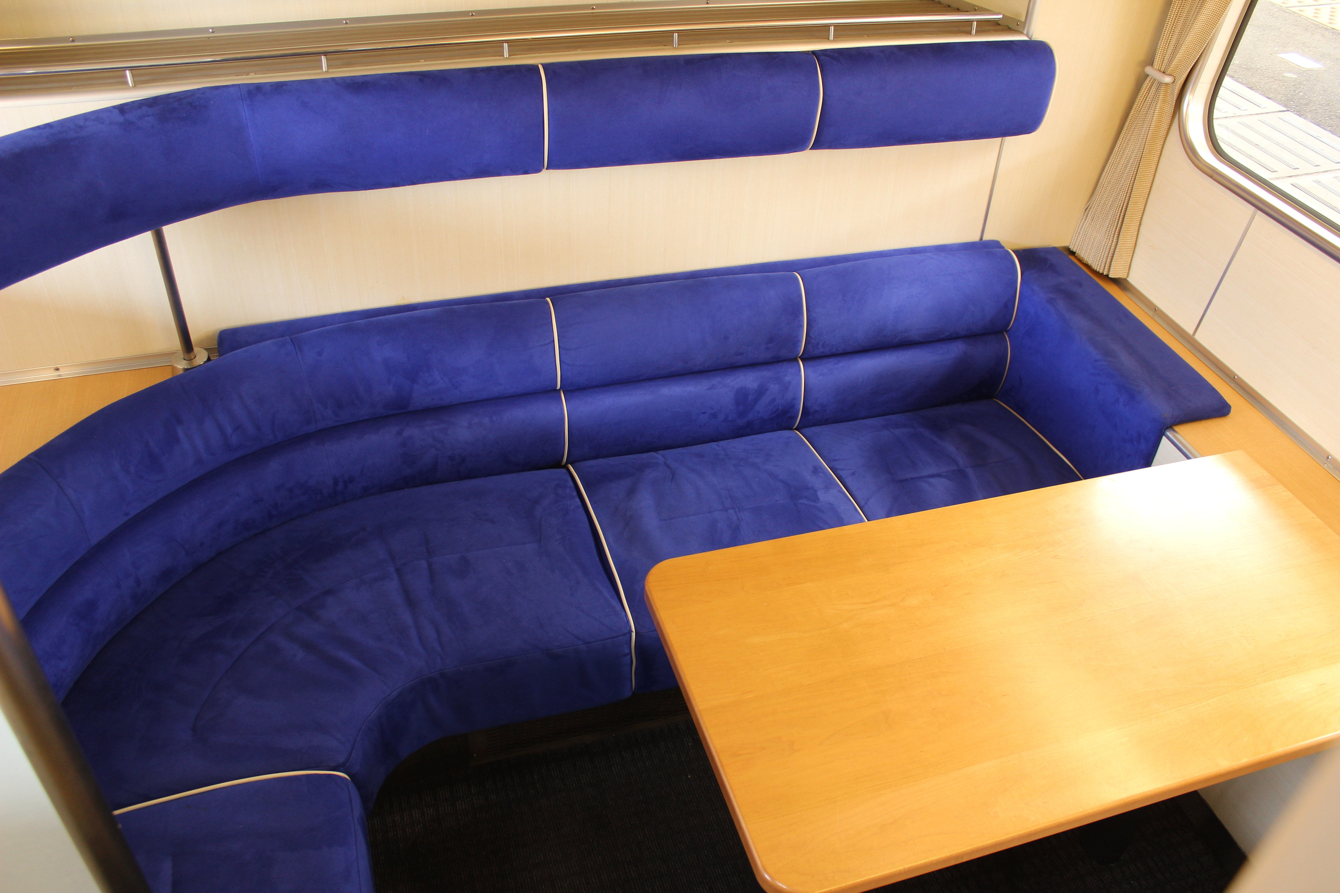 近鉄30000系1階席